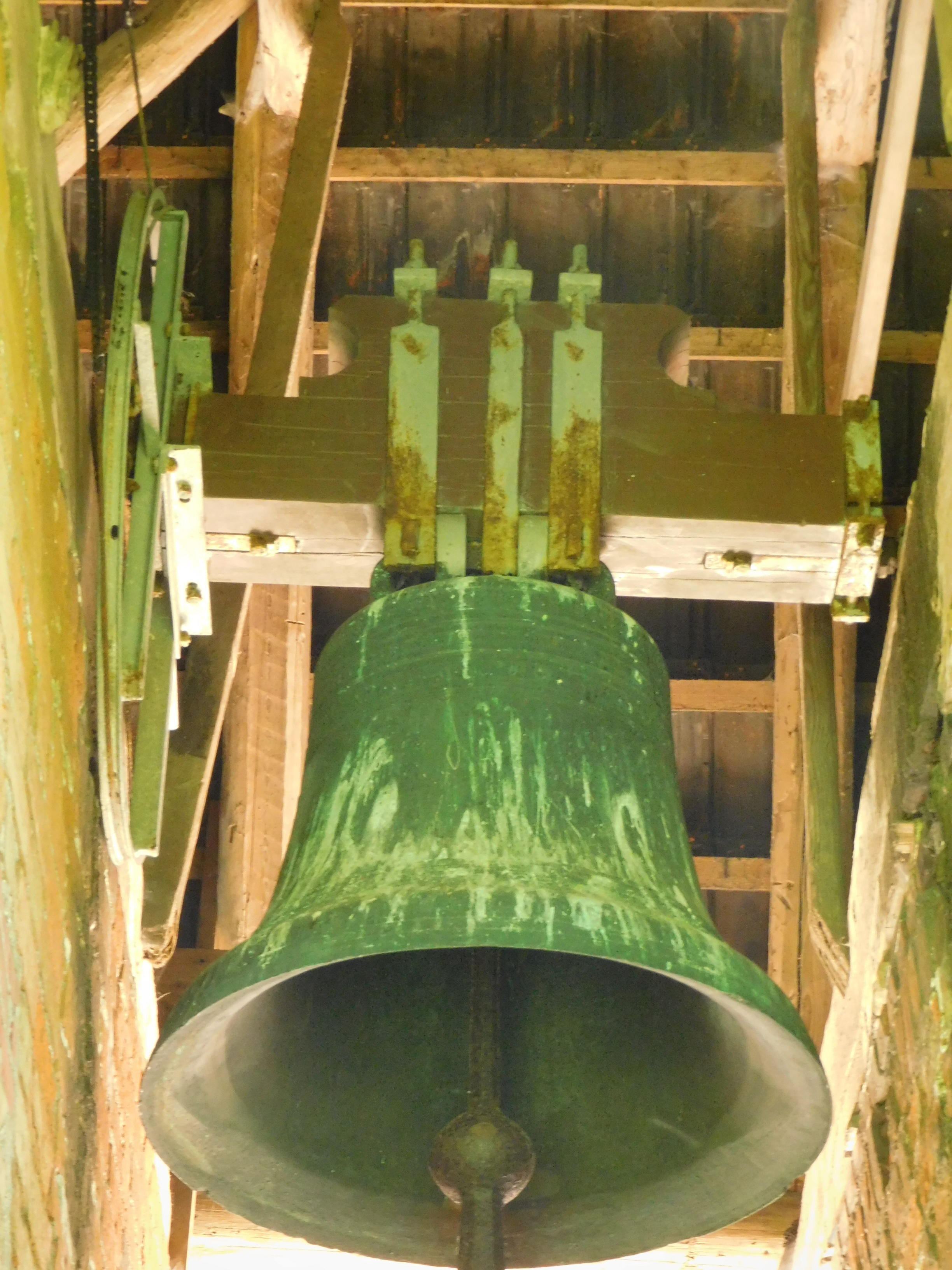 Glocke der evangelisch-lutherischen Kirche Wüppels, Gemeinde Wangerland, Niedersachsen, Deutschland